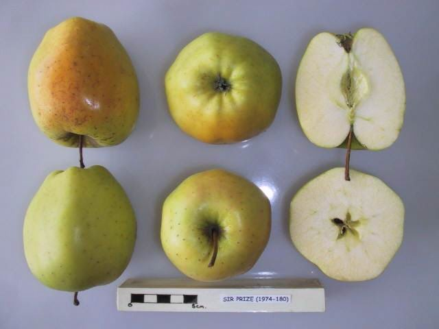 Sir Prize